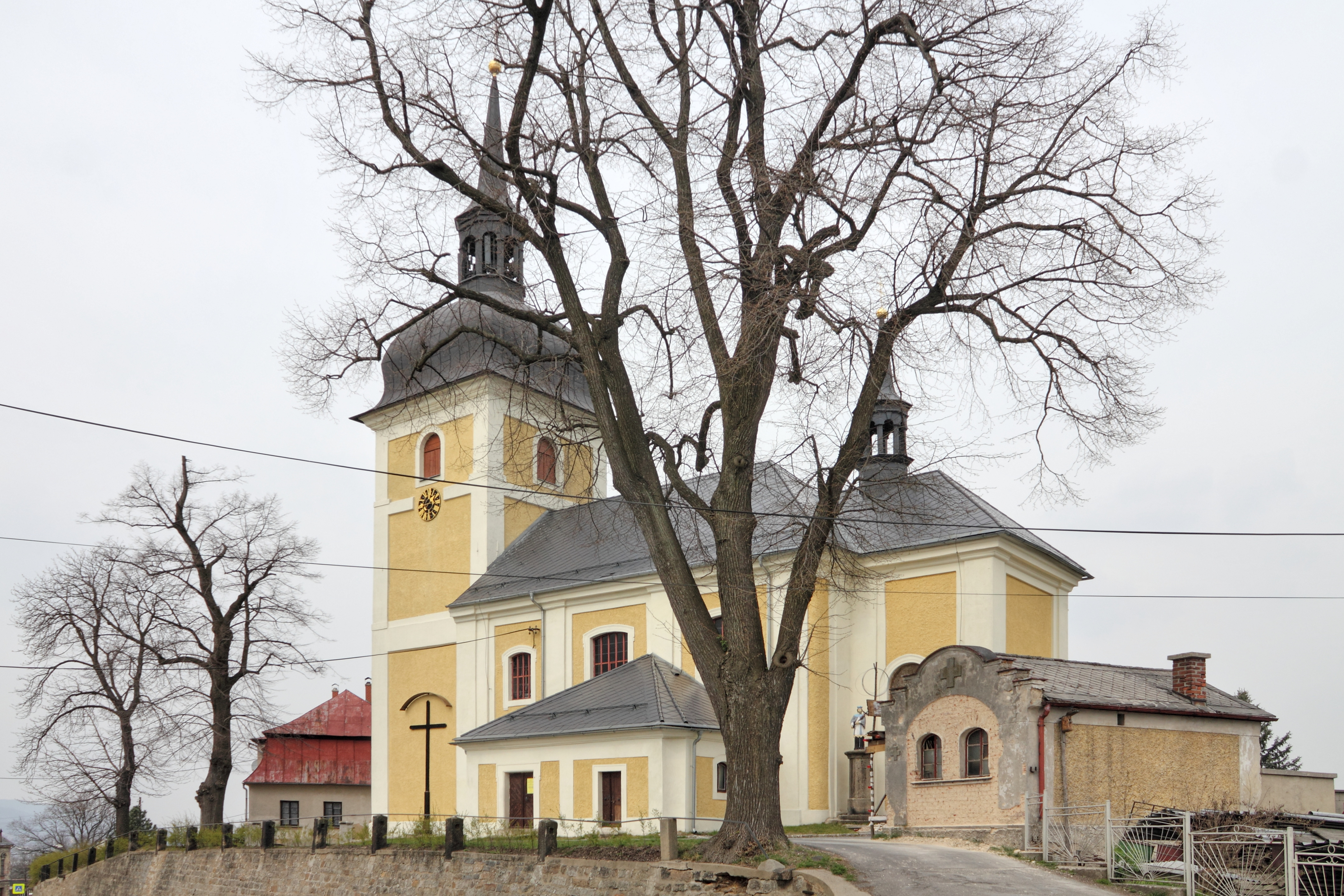 Kostel sv. Vavřince v Dlouhém Mostě, okres Liberec